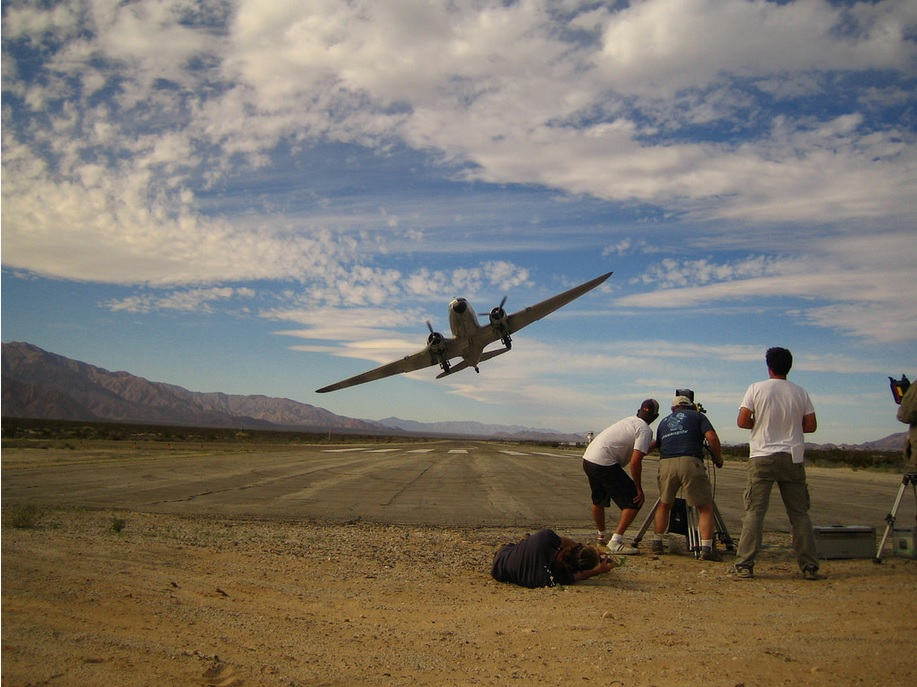 Aeropuerto San Felipe, Mexicali, Baja California/ San Felipe Airport, Mexicali, Baja California